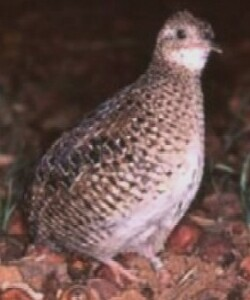 Codorna-pequena (Taoniscus nanus)